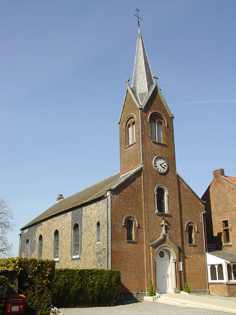 Church in Tinlot, Belgium